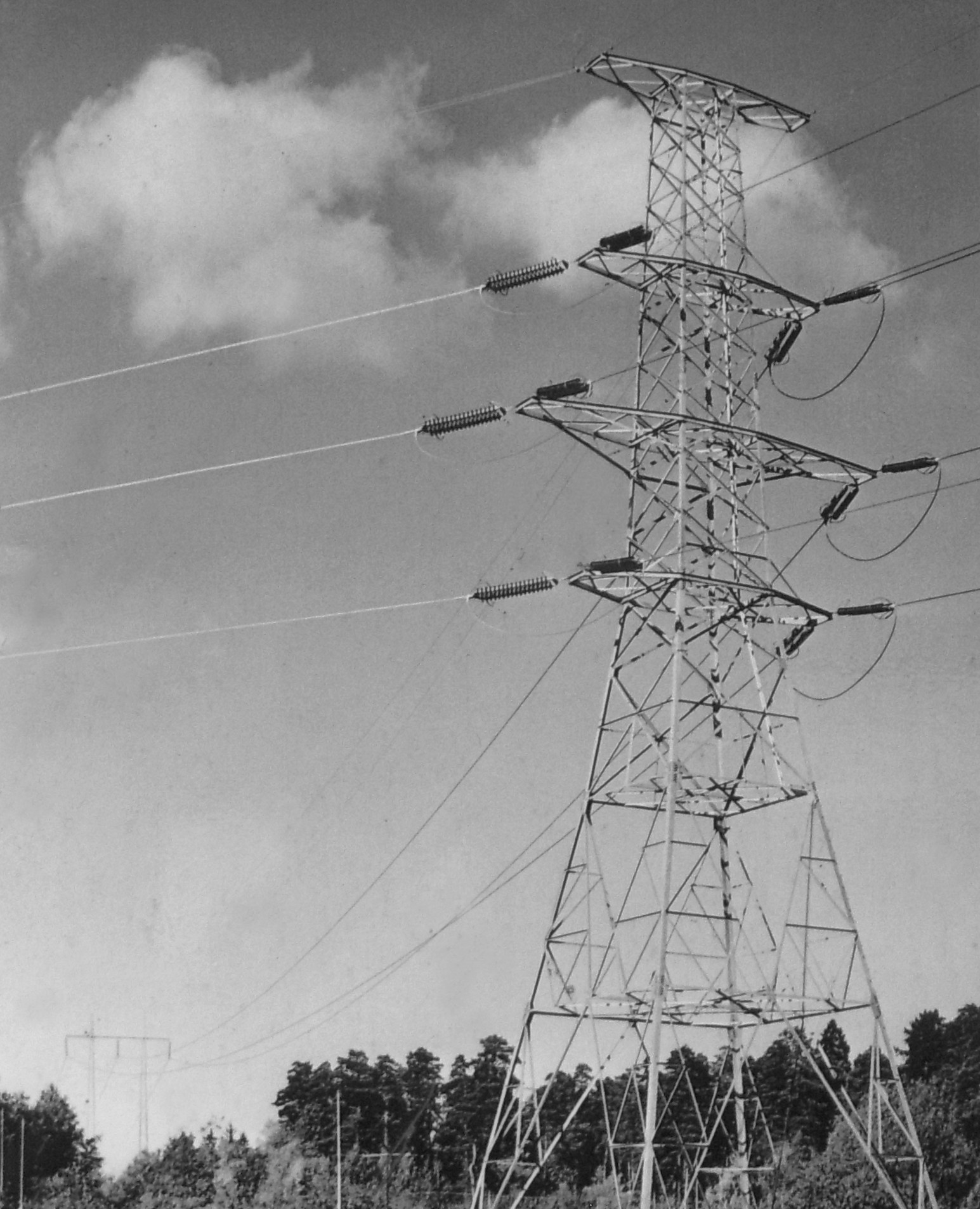 Kraftledning Untran-Värtan